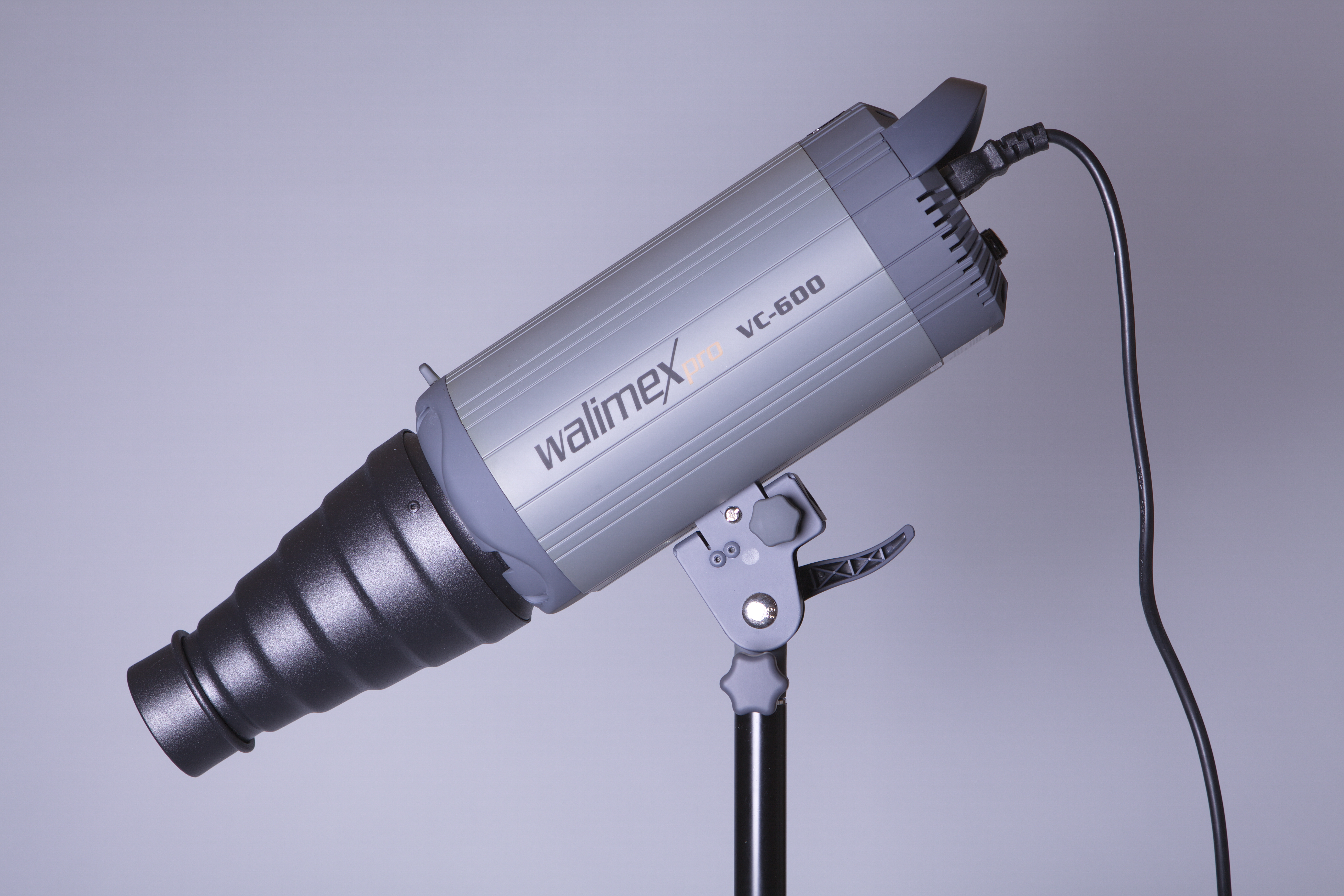 Vyšší odborná škola uměleckoprůmyslová a Komínek a záblesková hlava Walimex